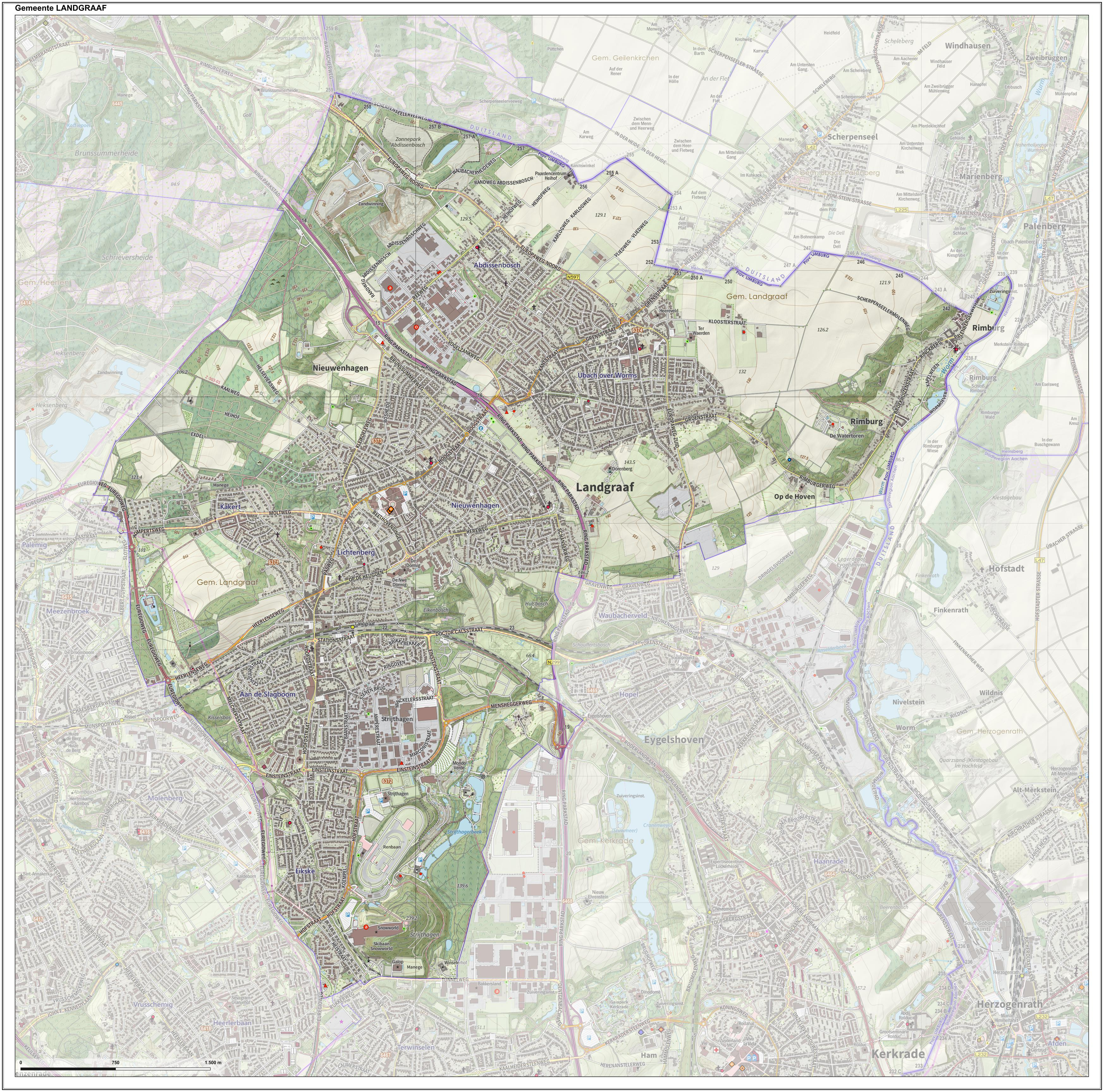 Topografische gemeentekaart. Resolutie: 400 pixels/km. Kaartbeeld samengesteld uit de open geodata van de Top10NL en Top25namen (Kadaster), Creative Commons-BY licentie. Gebouwvlakken uit open geodata BAG extract. Wegen uit de OpenStreetMap, OpenStreetMap community. Reliëfschaduw uit de Actuele Hoogtekaart AHN2. Samenstelling en kleurenschema: Jan-Willem van Aalst, met QGIS. Zie ook de Legenda.